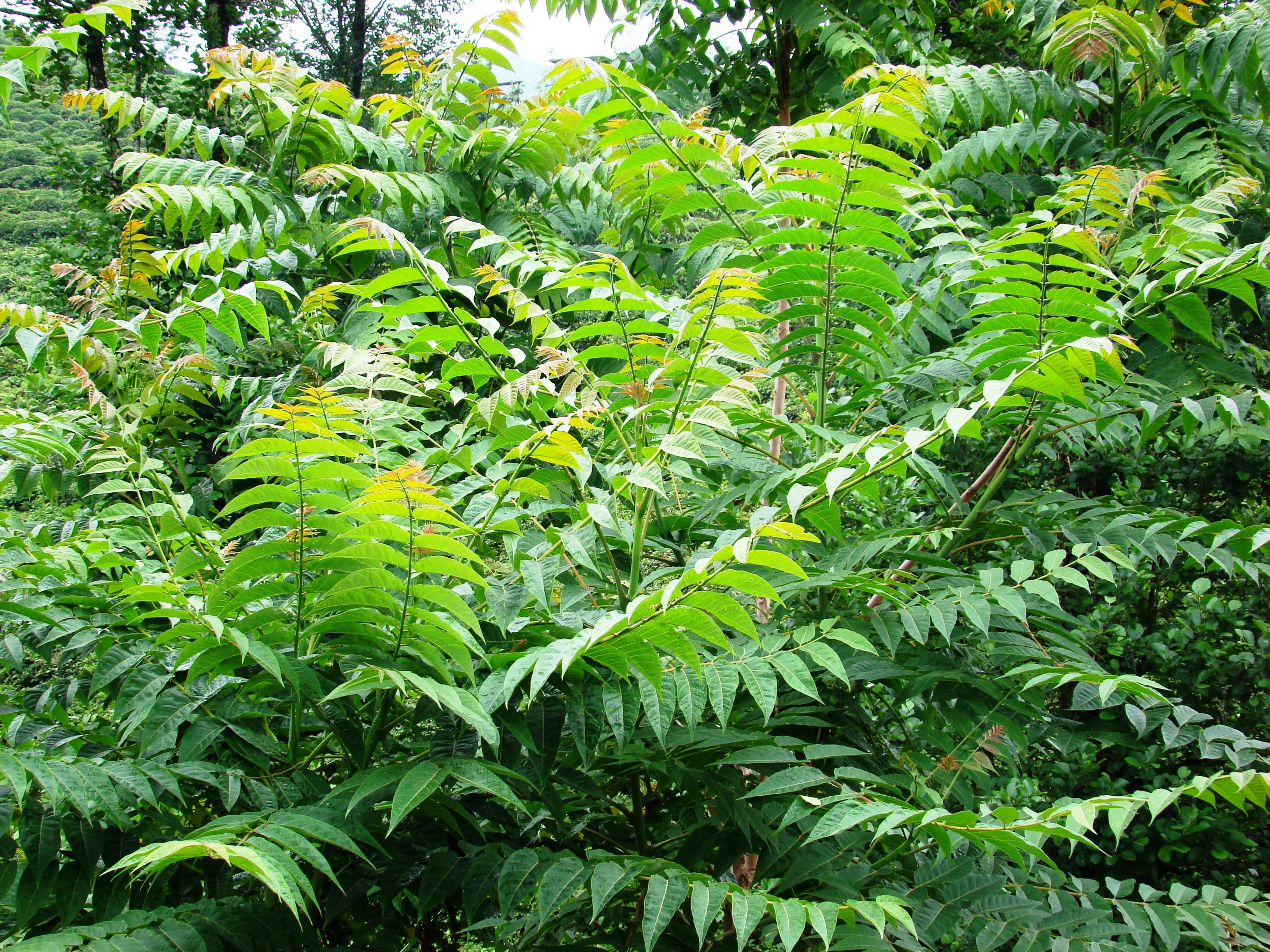 Kokarağaç (Ailanthus altissima)